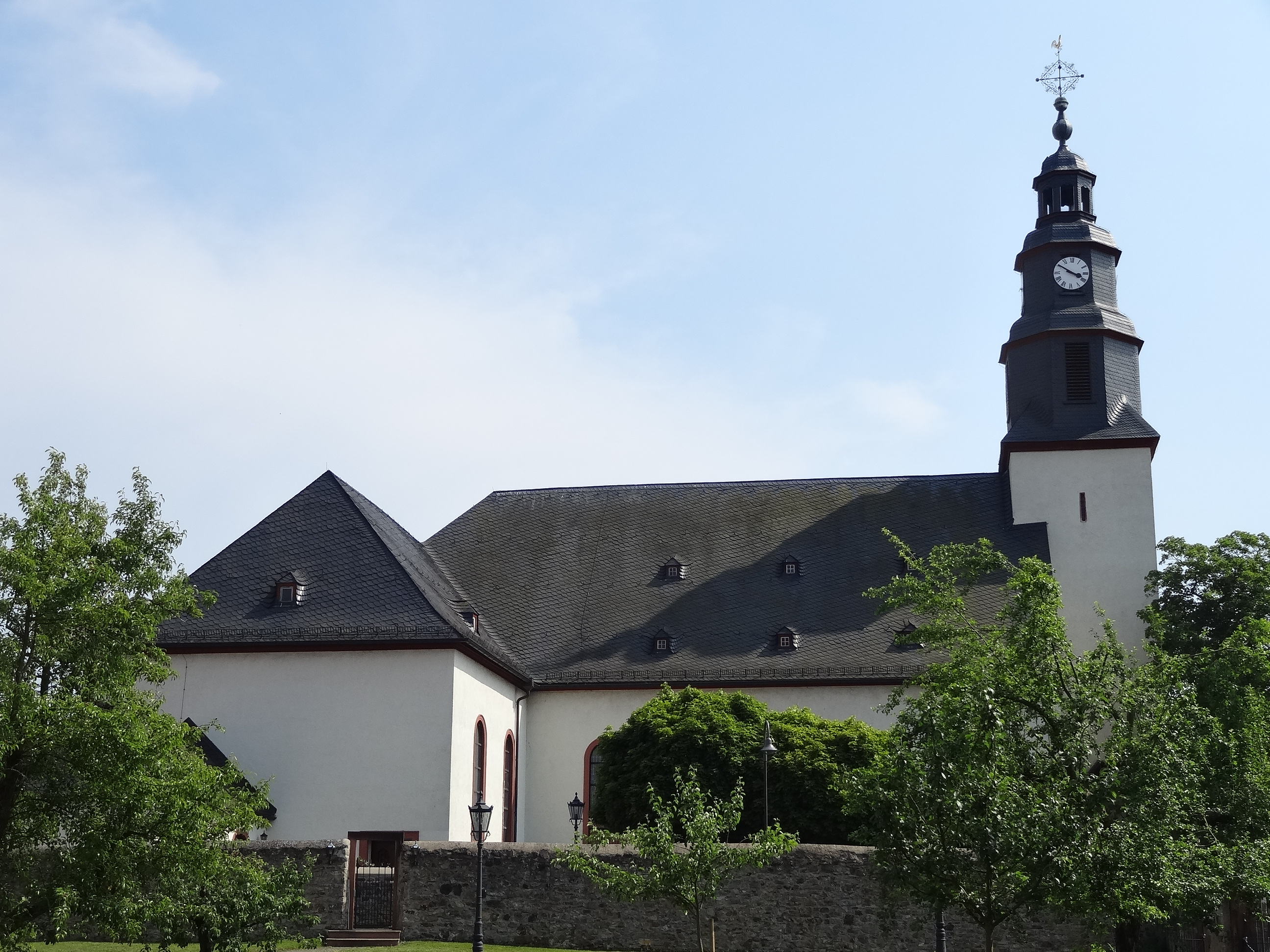 Katholische Kirche Ober-Mörlen